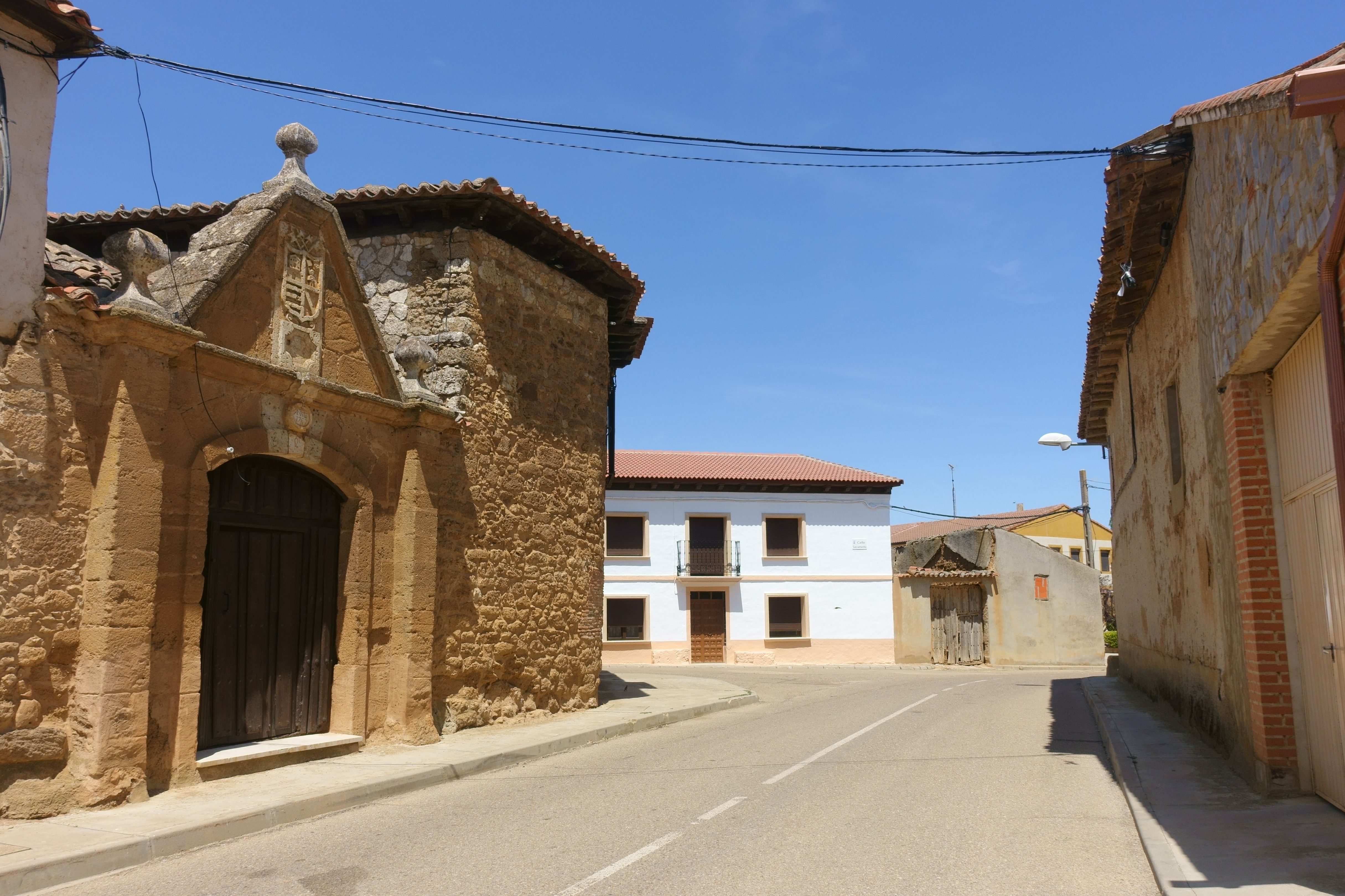 Calle Ancha en Morales de Campos (Valladolid, España).